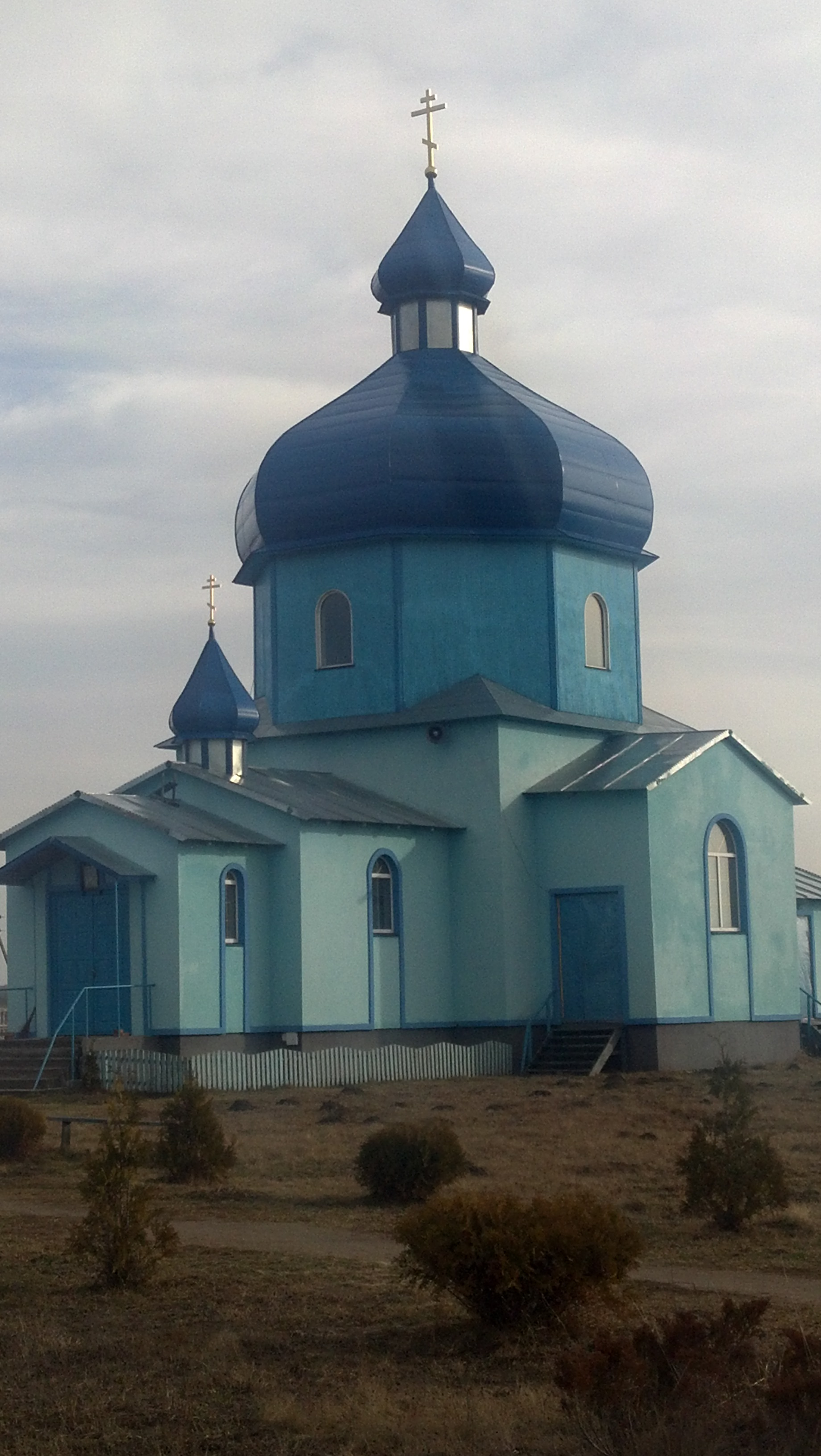 Зображена церква с.Данчиміст, Костопільського району, Рівненської області